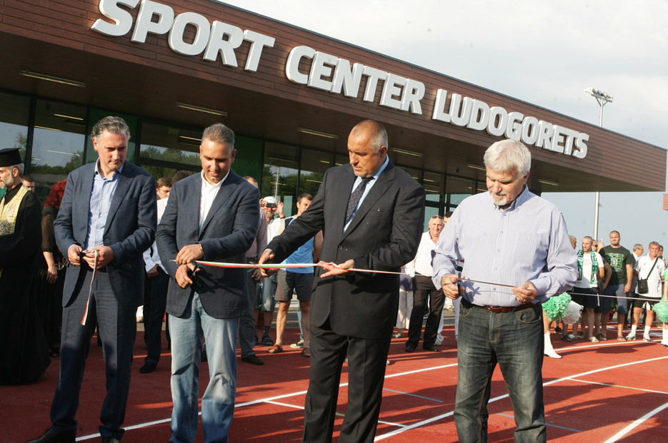 ренировъчната база на Лудогорец бе открита на 21 юни, 2012 година. Лентата на кампа преряза лично министър-председателят Бойко Борисов. „Гнездо на орли“ е не само най-модерният комплекс в България, но е и сред най-модерните такива в Европа, потвърдиха от немската фирма „Polytan“, която поставя изкуствените терени в Бундеслигата. Това обяви при откриването на тренировъчната и база един от собствениците на тима – Георги Домусчиев. Обектът бе изграден за по-малко от година, припомни той. В него влизат терен с естествено покритие и лекоатлетическа писта, изкуствен терен, два маломерни терена, които през зимата ще могат да се покрият и отопляват, фен магазин, фитнес, спа център, конферентна зала. Сред екстрите на комплекса са настилките на всички терени, те са последно поколение и са конструирани с цел запазване здравето на спортистите.